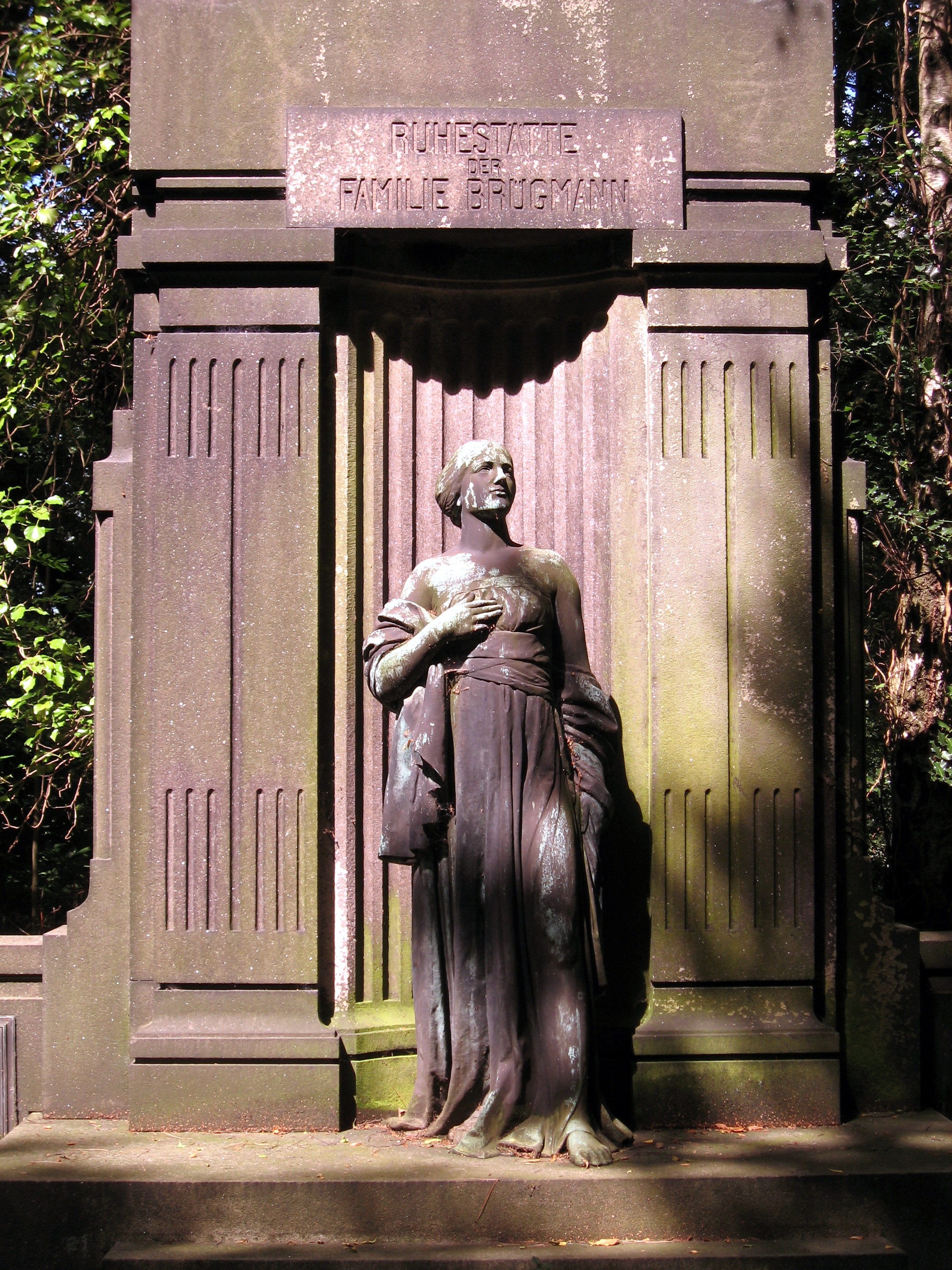 Dortmund, Innenstadt-Ost, Ostenfriedhof (=Ostfriedhof), Grabmal Brügmann